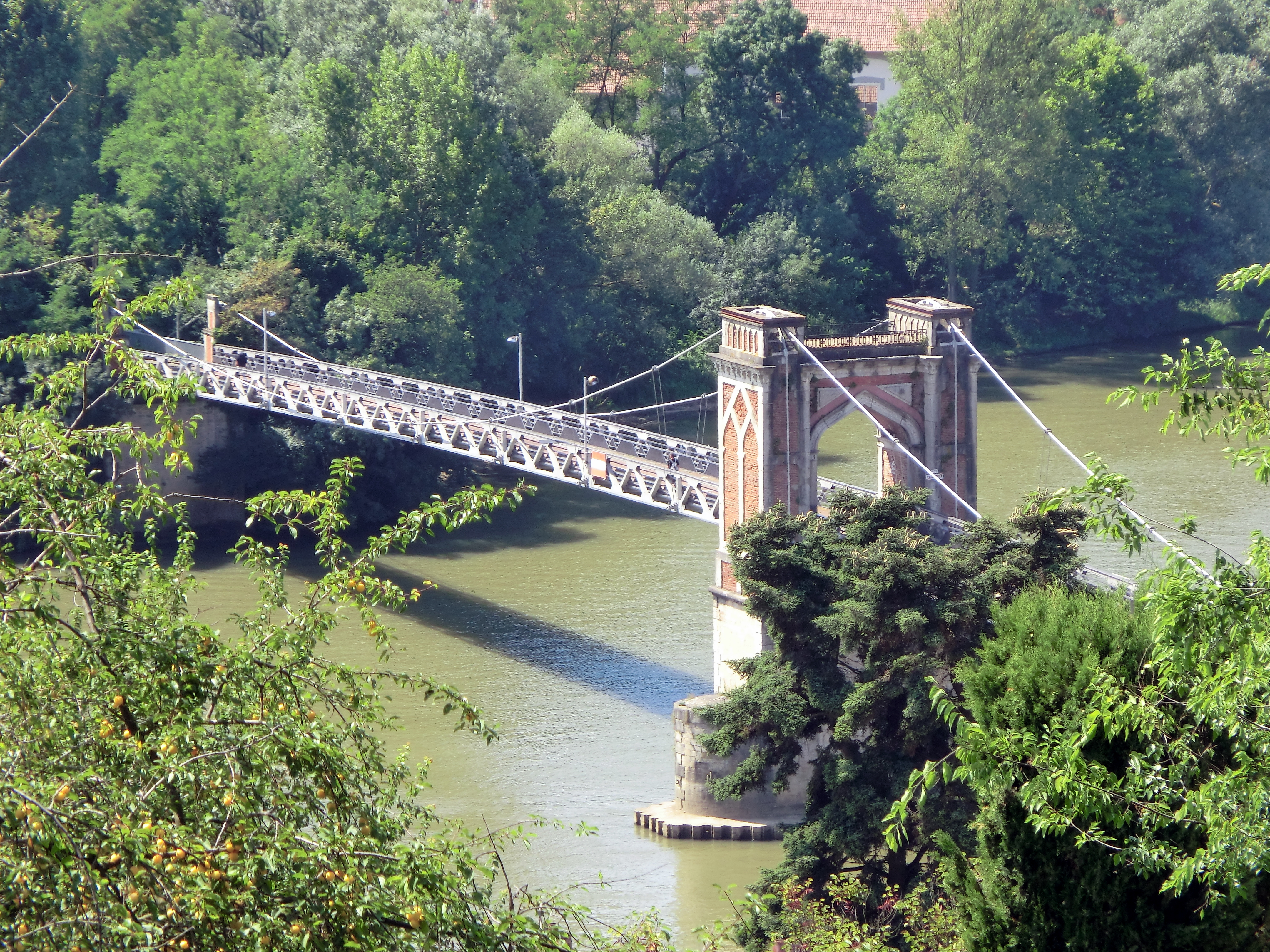 Passerelle de Trévoux en août 2013.